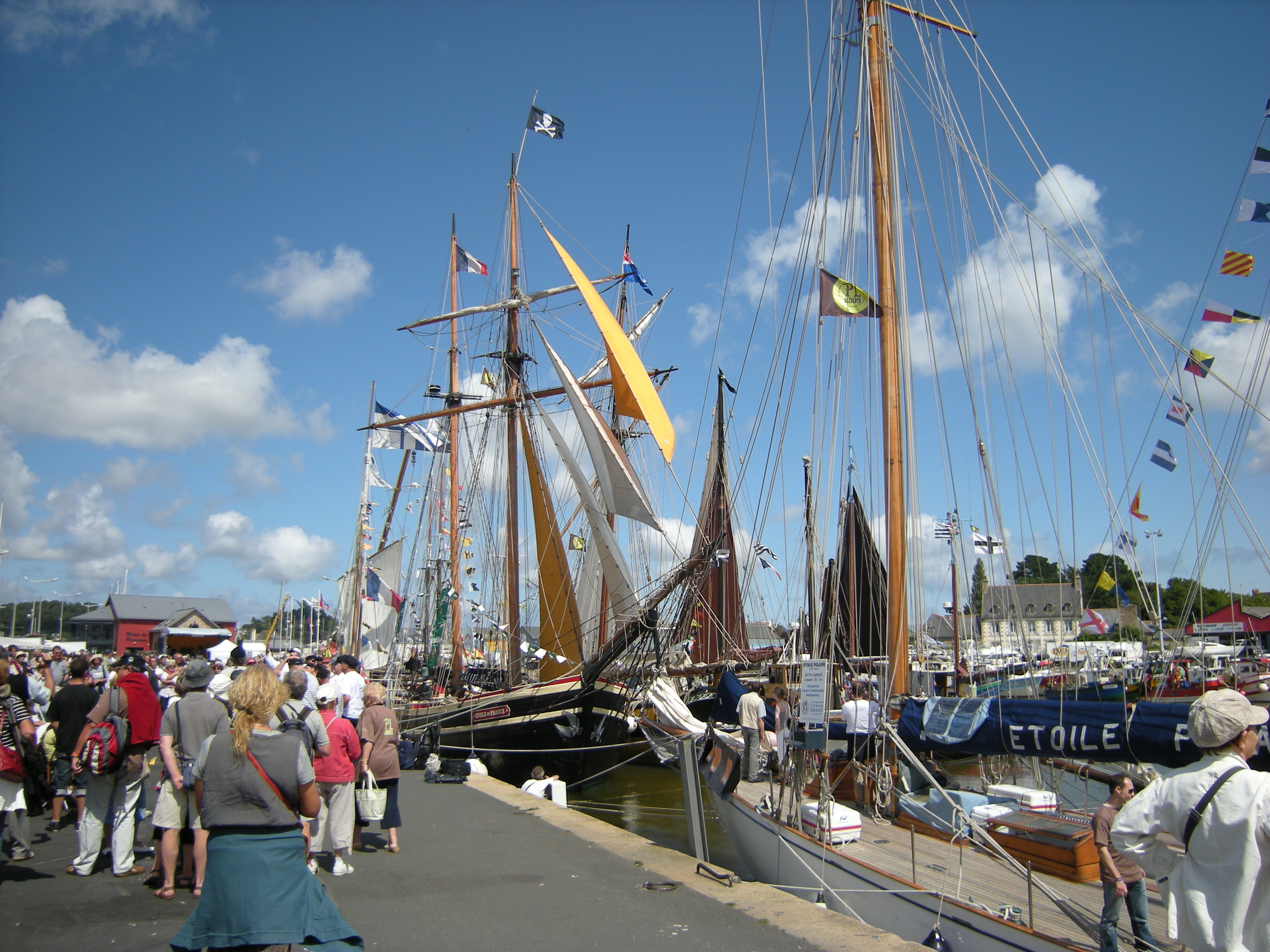 Festival du chant de marin. Paimpol 2009